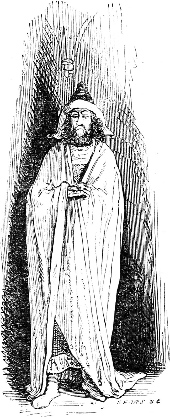 Une illustration pour l’article Anguekkok dans le Dictionnaire infernal par Collin de Plancy.